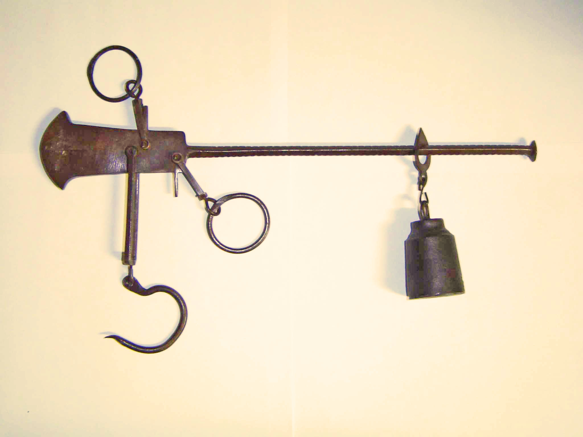 Photo personnelle de ma collection